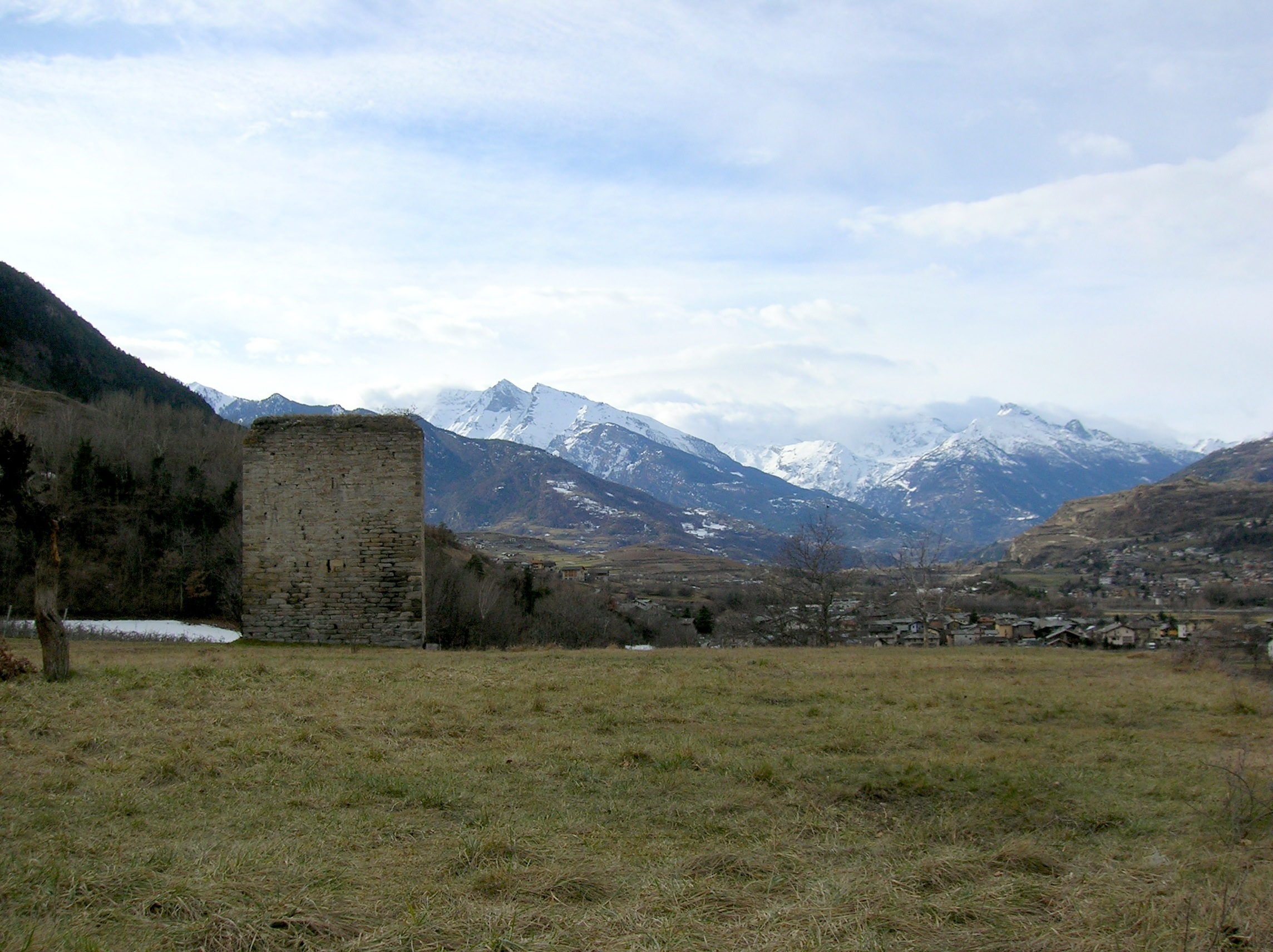 Torre di la Plantaz, lato est, Gressan, Valle d'Aosta, Italia.